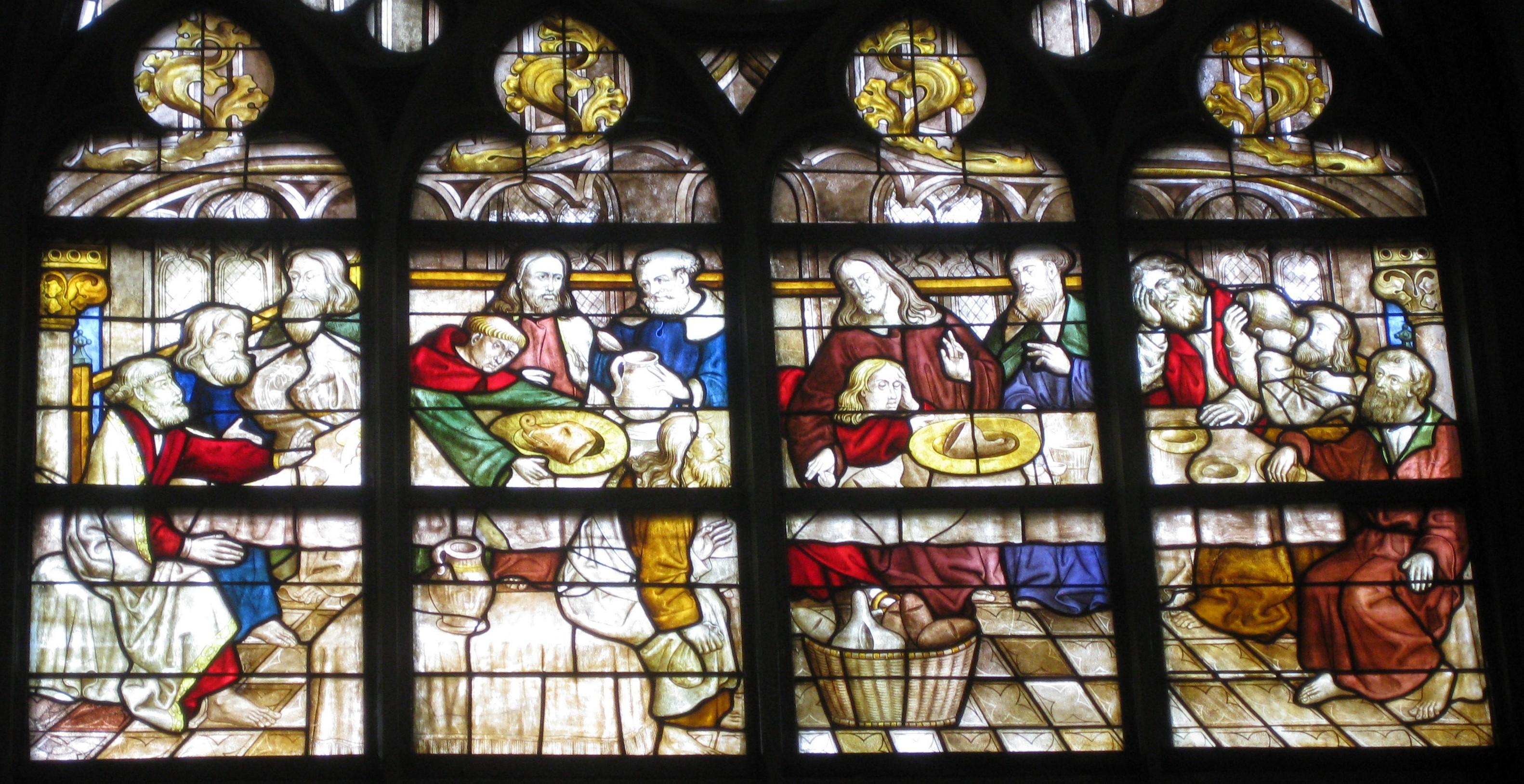 Glasfenster Das Westfälische Abendmahl in der Wiesenkirche in Soest (Deutschland).